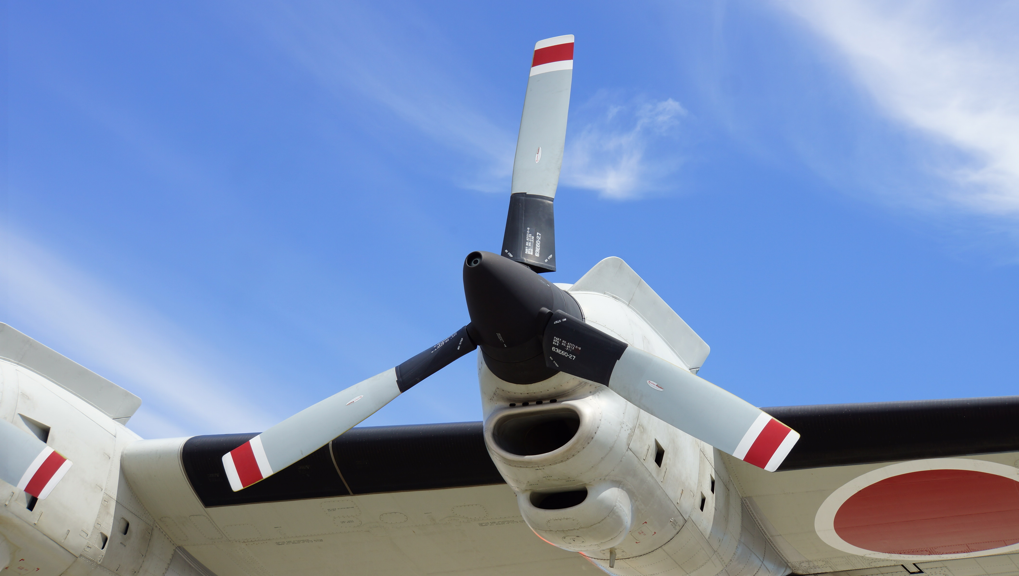 海上自衛隊 US-1A救難飛行艇（9089号機） T64-IHI-10Jターボプロップエンジン（左主翼、内側） 左前面。2014年9月14日 岩国航空基地にて。